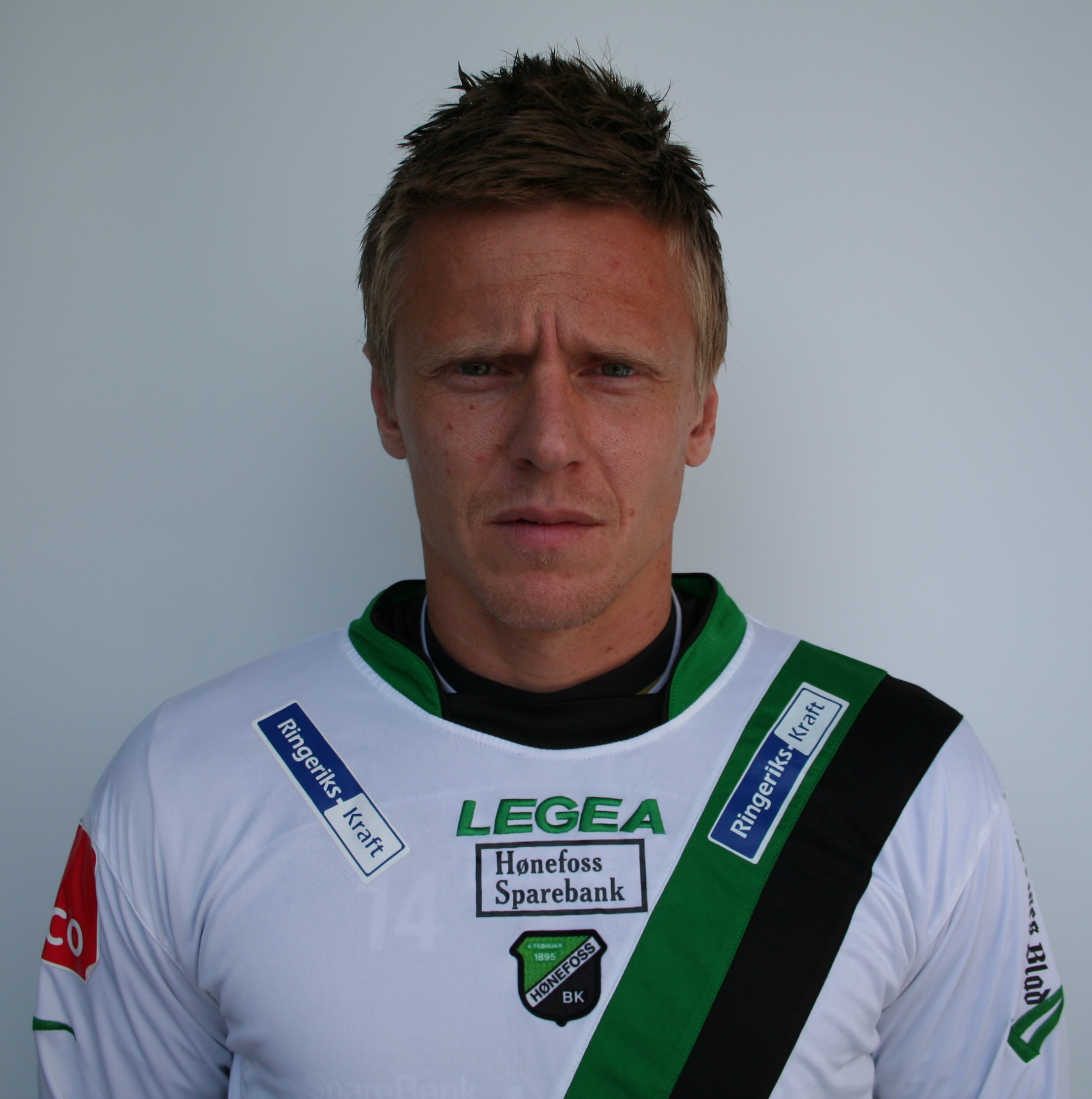 Lennart Steffensen, norsk fotballspiller som spiller for Hønefoss Ballklubb.